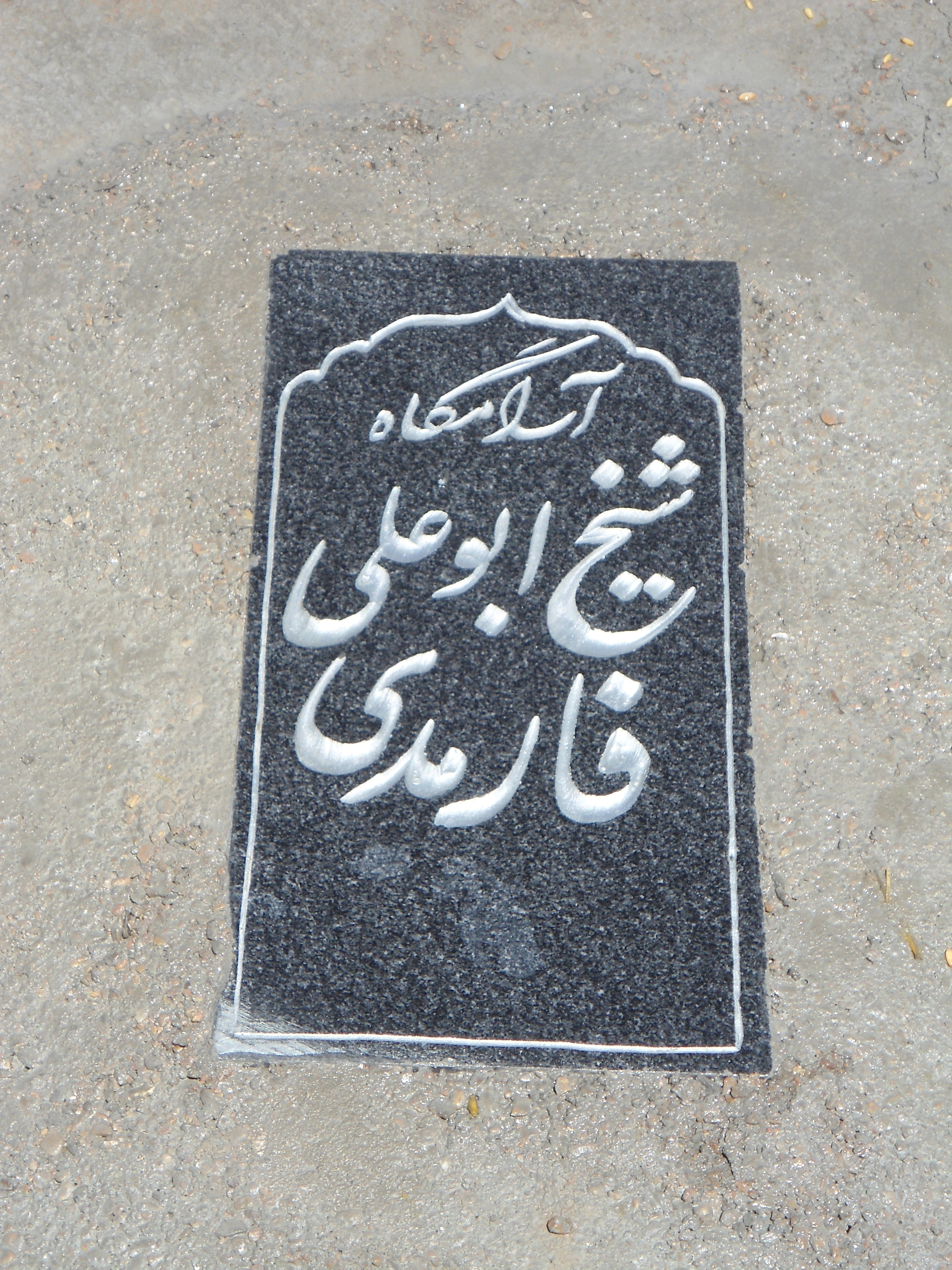 Hazrat Sheikh Abu Ali Farmadi Rahmat Ullah Alaih